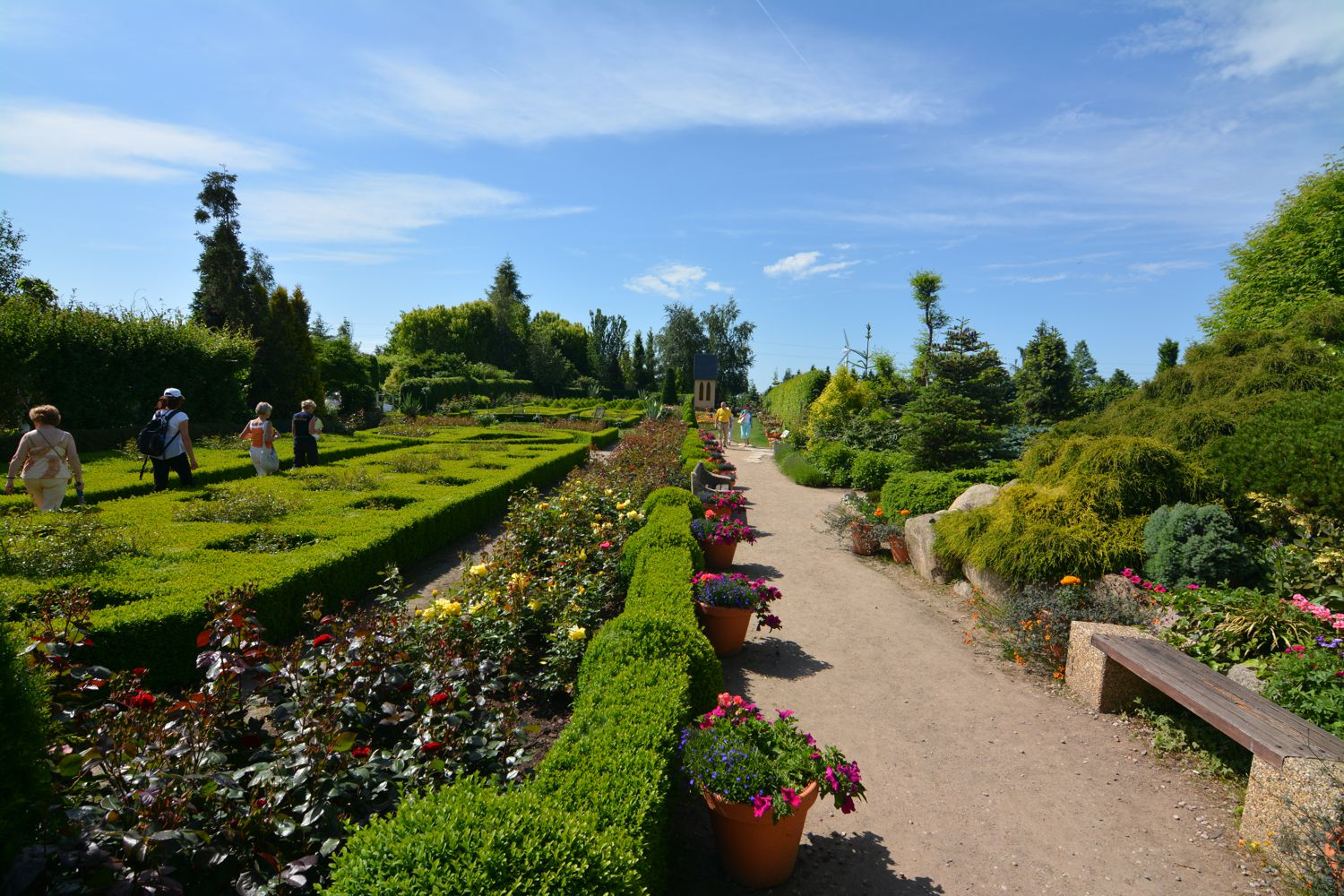 Ogrody Hortulus w Dobrzycy